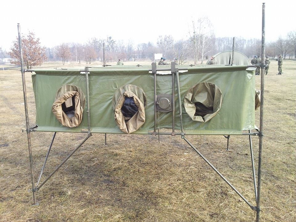 Widok ściany komory grupowej KG-12